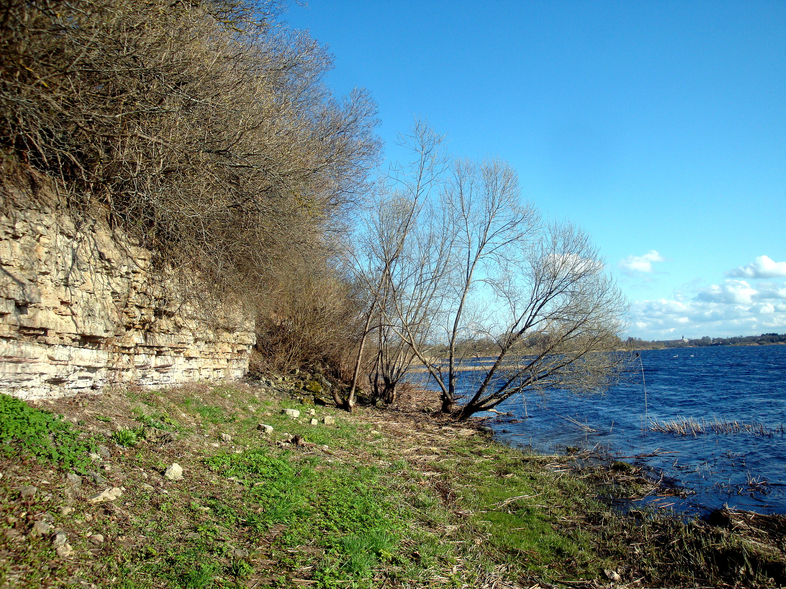 Daugava river near Dole Island